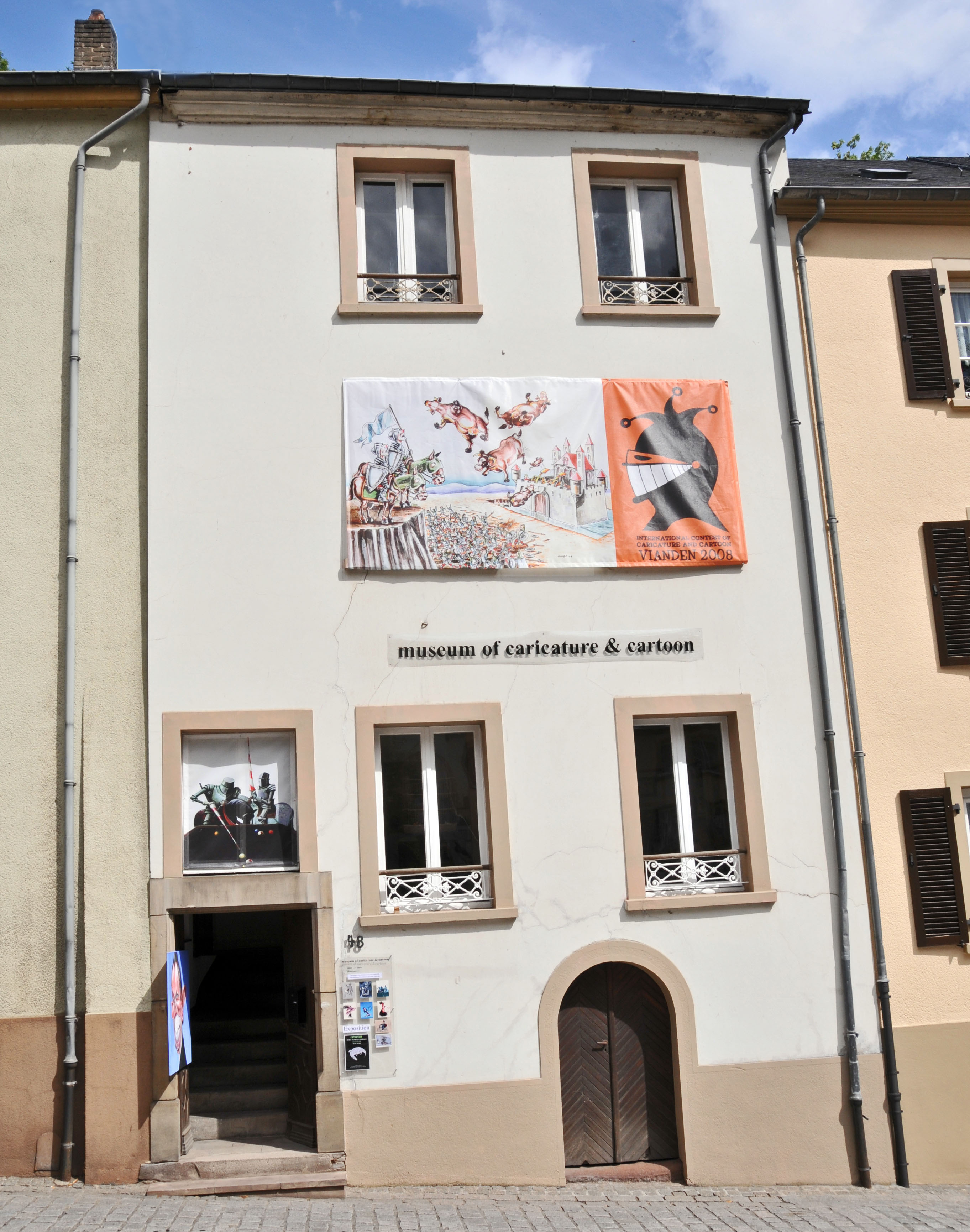 Musée vun der Karikatur a vum Cartoon zu Veianen am Abense Vic sengem fréieren Haus. Kategorie:Gemeng Veianen Kategorie:Muséeën zu Lëtzebuerg